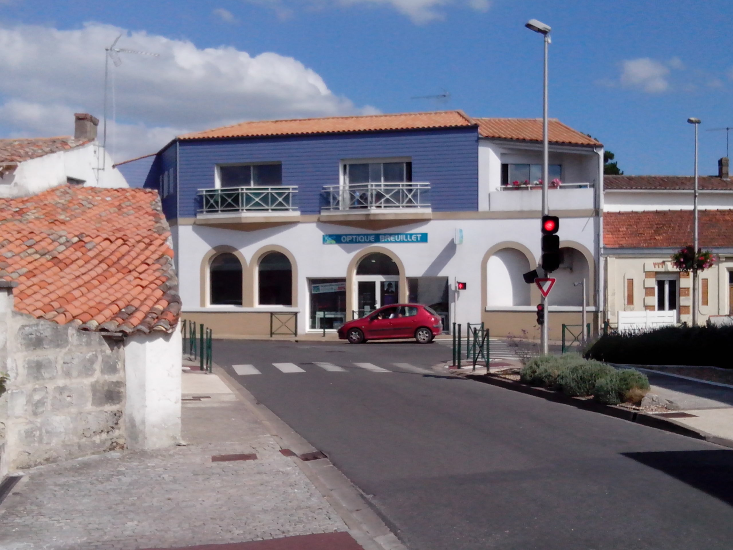 Un carrefour dans le centre-ville de Breuillet